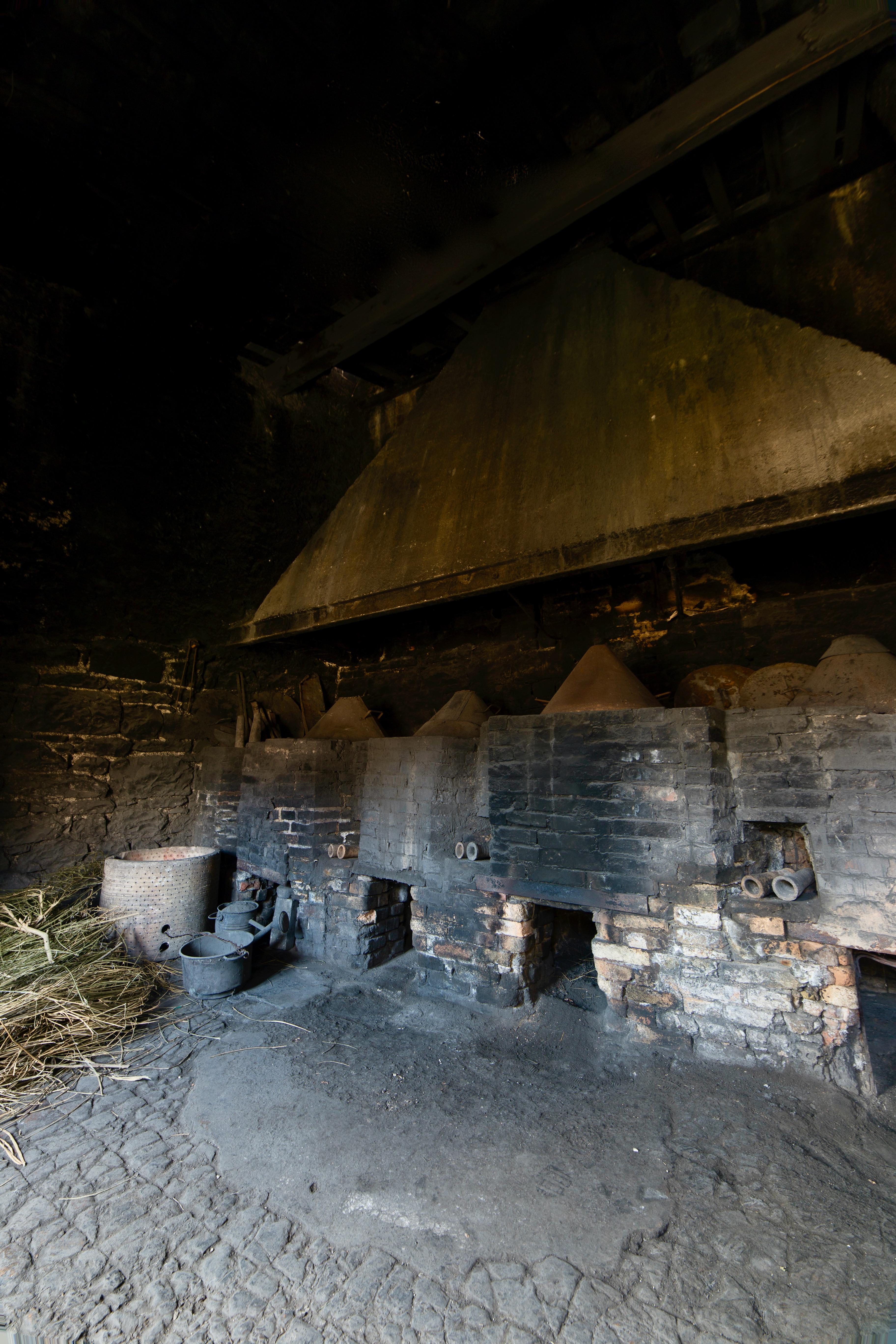 Sala del Riverbero del Museo Opificio Rubboli, sono presenti quattro forni a muffola costruiti da Paolo Rubboli nel 1884